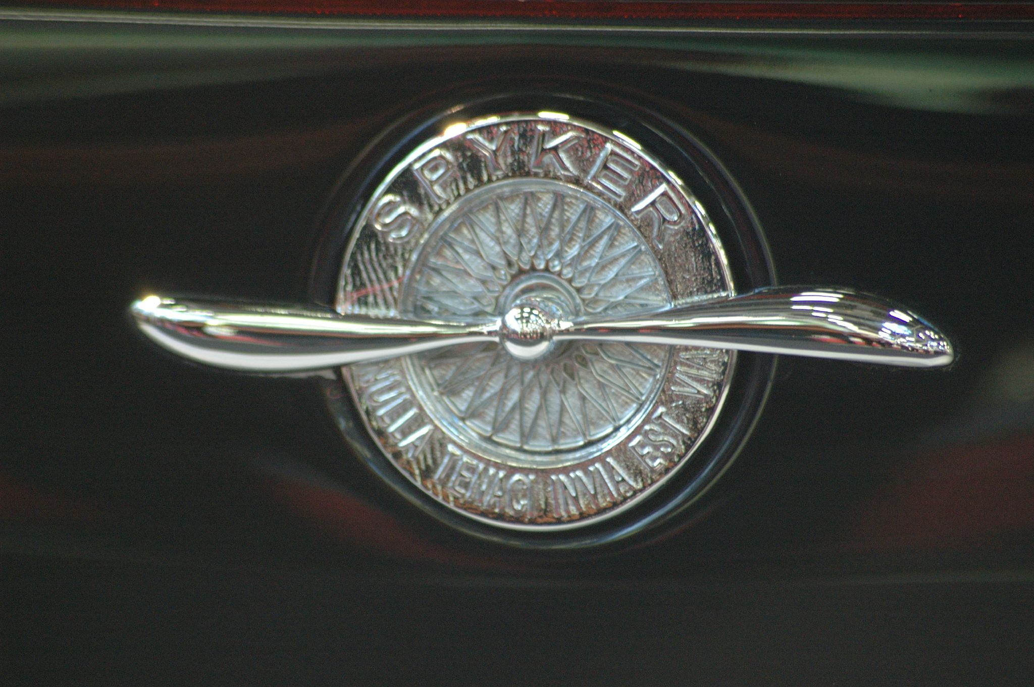 Spyker